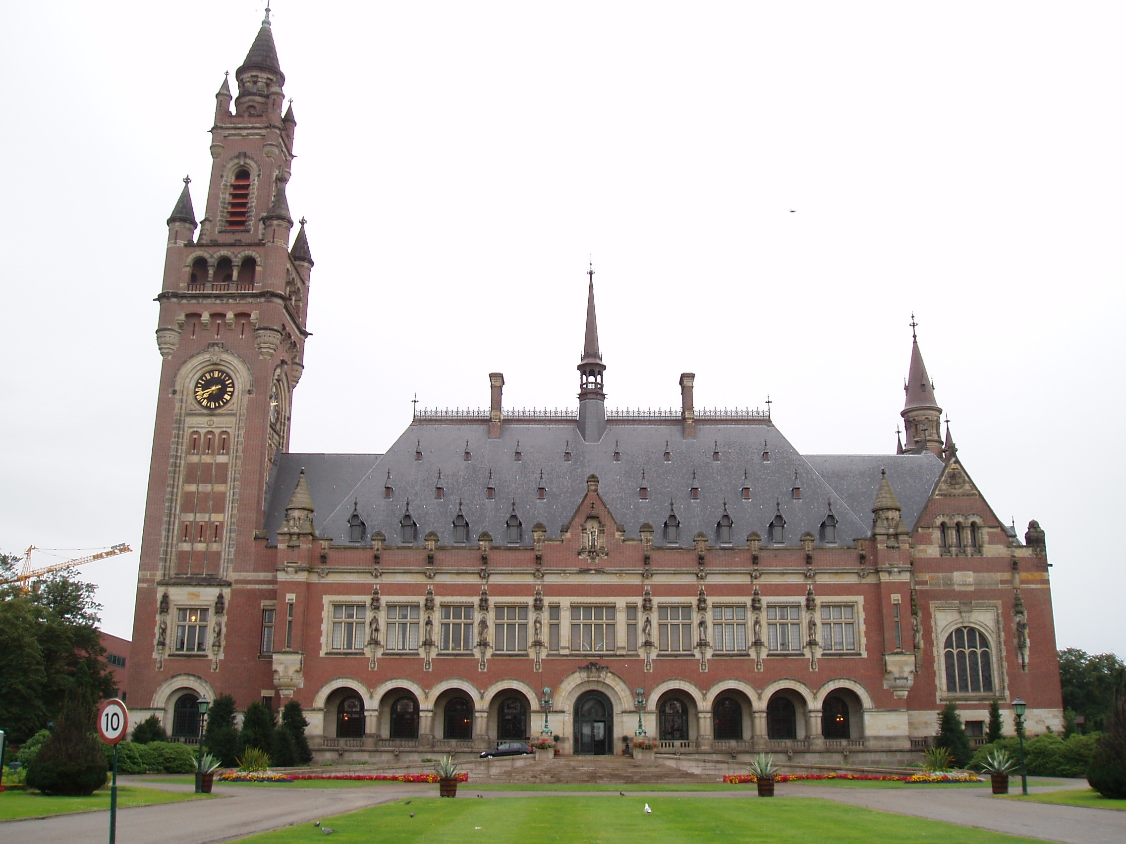 Den Haag Peace Palace